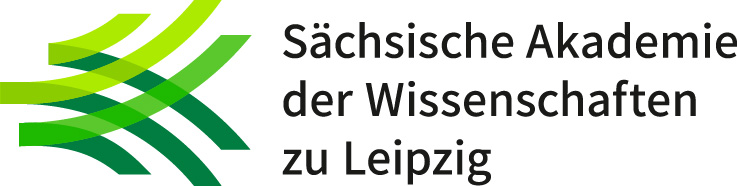 Logo der Sächsischen Akademie der Wissenschaften zu Leipzig